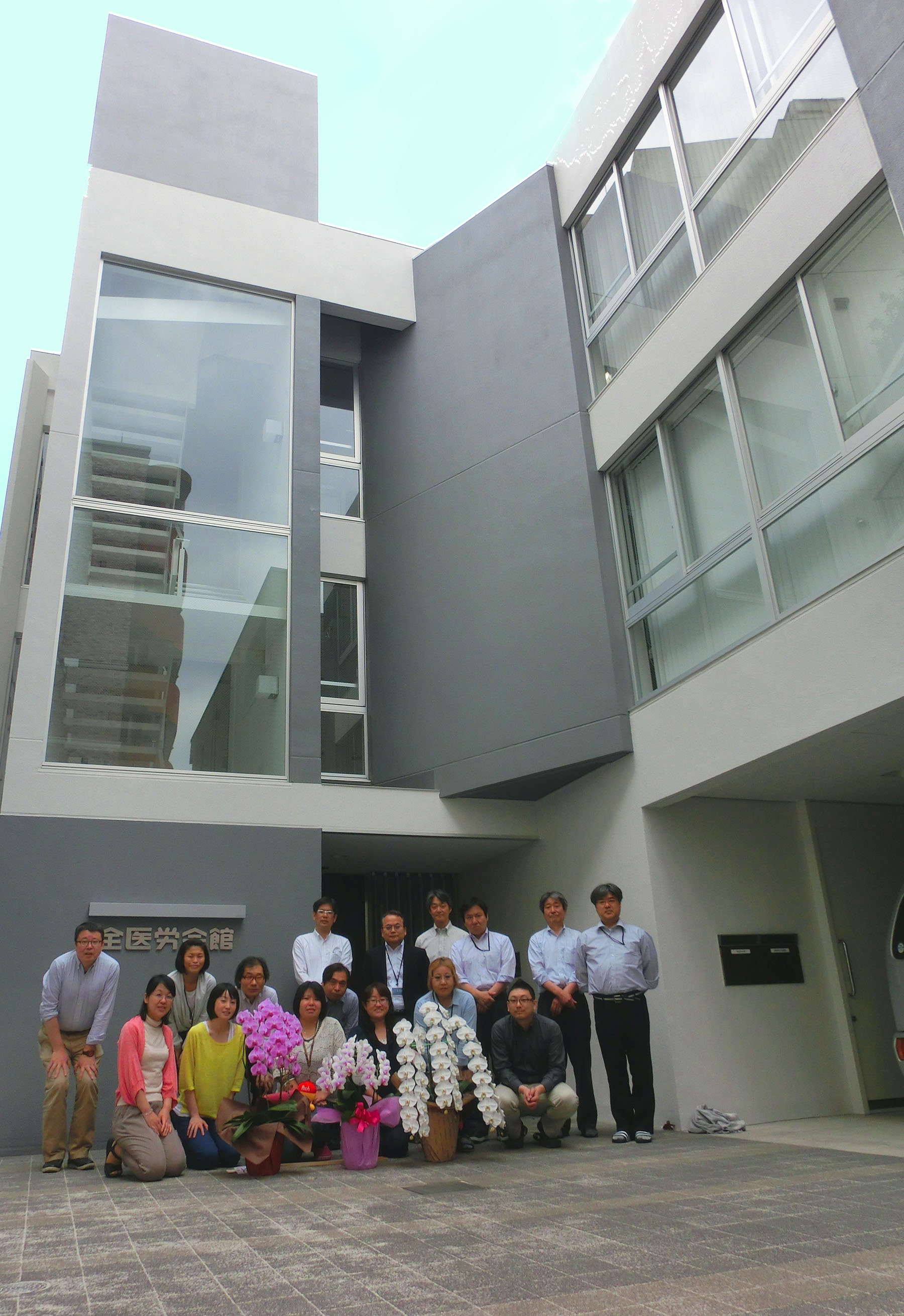 2013年５月に、東京都豊島区南大塚の新会館に移転しました。